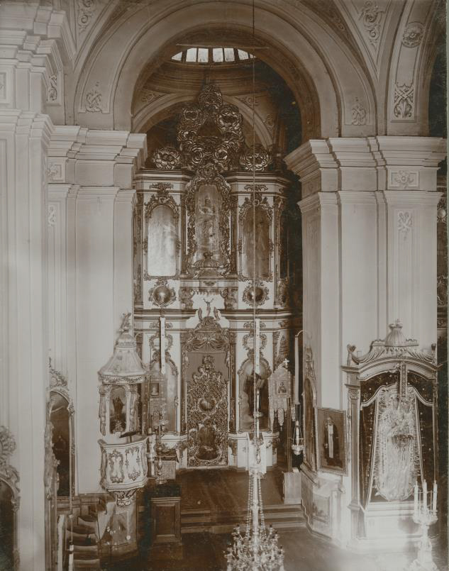 Унутры Спаскай царквы Спаскага манастыра ў Магілёве (Спаскі завулак).Беларуская (тарашкевіца): Магілёў (Mahiloŭ), завулак Спаскі (zavułak Spaski). Манастыр Сьвятога Спаса